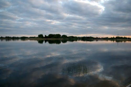 Keturvalakių ežeras, Keturvalakiai.